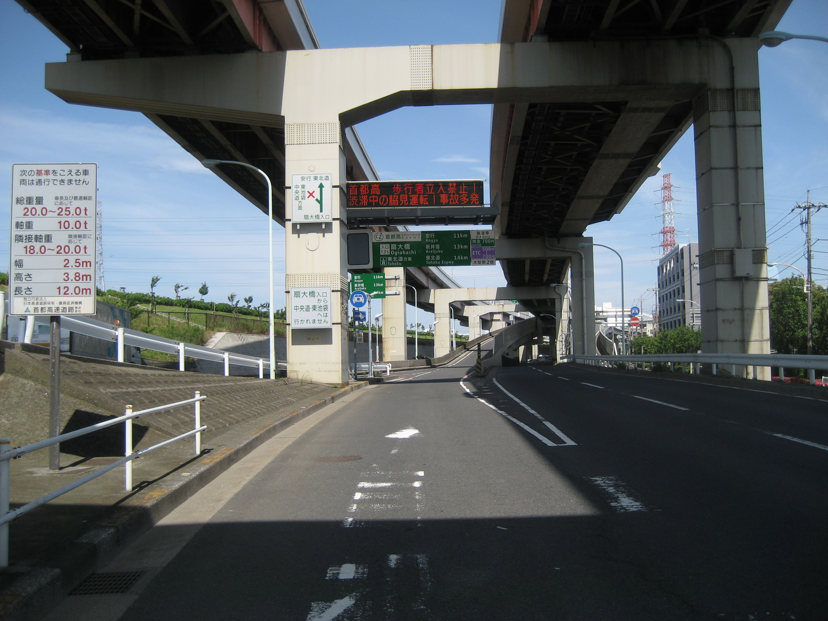 首都高速中央環状線扇大橋入口付近（都道450号線側入口）